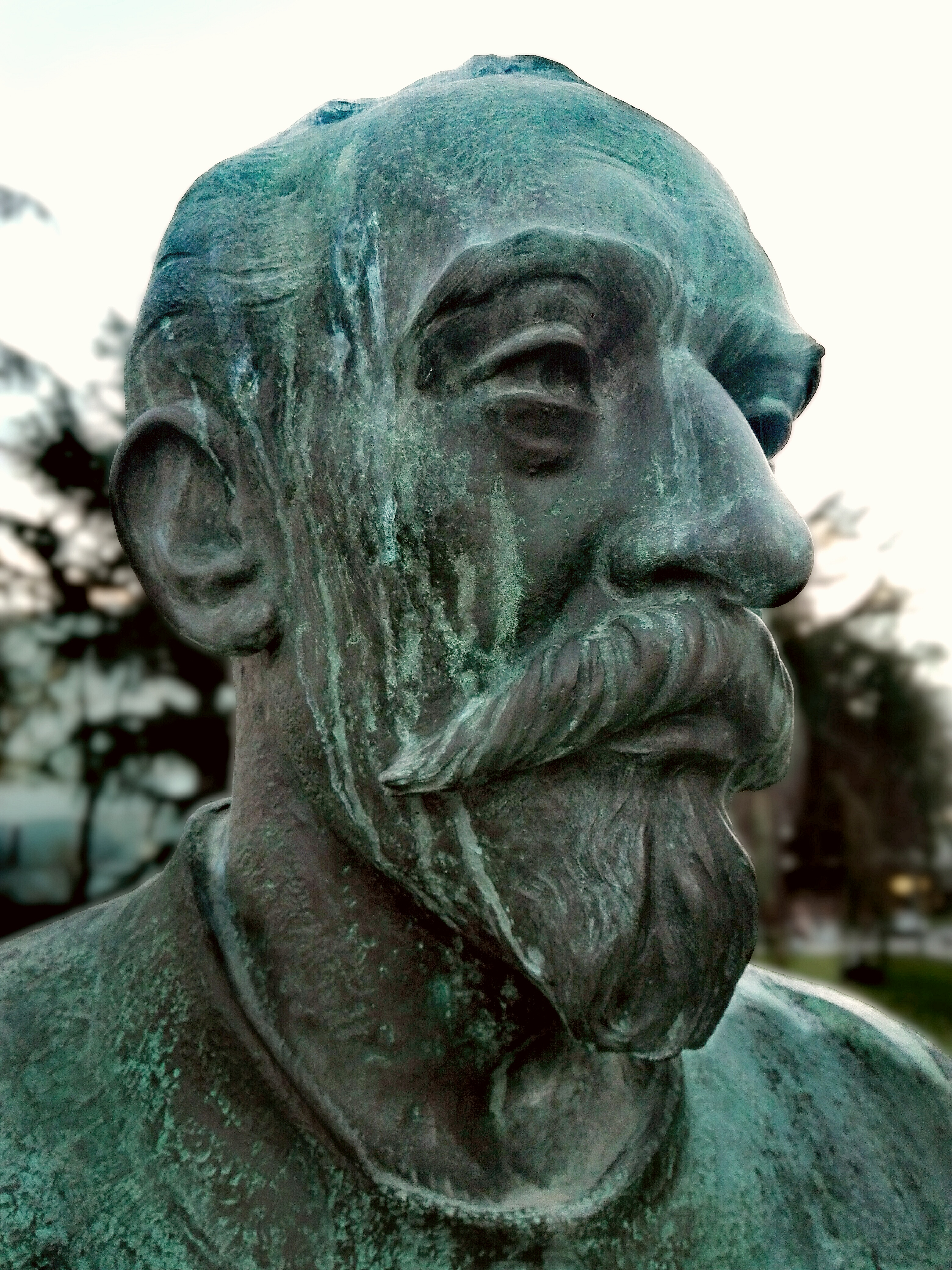 Monumento a Nicasio Landa Rafael Huerta, 1999 Mármol y bronce Busto: 91 x 81 x 57 cm Pedestal: 147 x 92 x 69 cm Temática: Homenaje (Médicos) Instalación (inauguración): 24 de abril de 1999 Ubicación: Jardines del Hospital de Navarra.